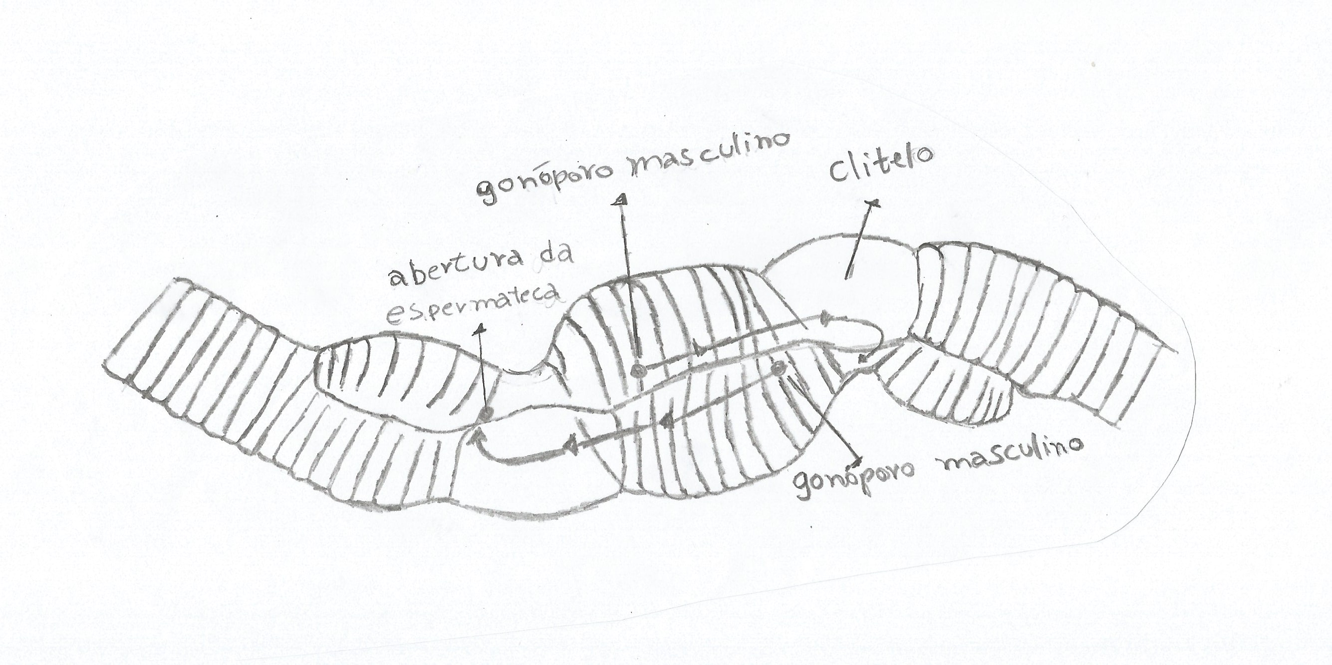 Copulação por transmissão indireta do espermatozoide da minhoca Eisenia foetida